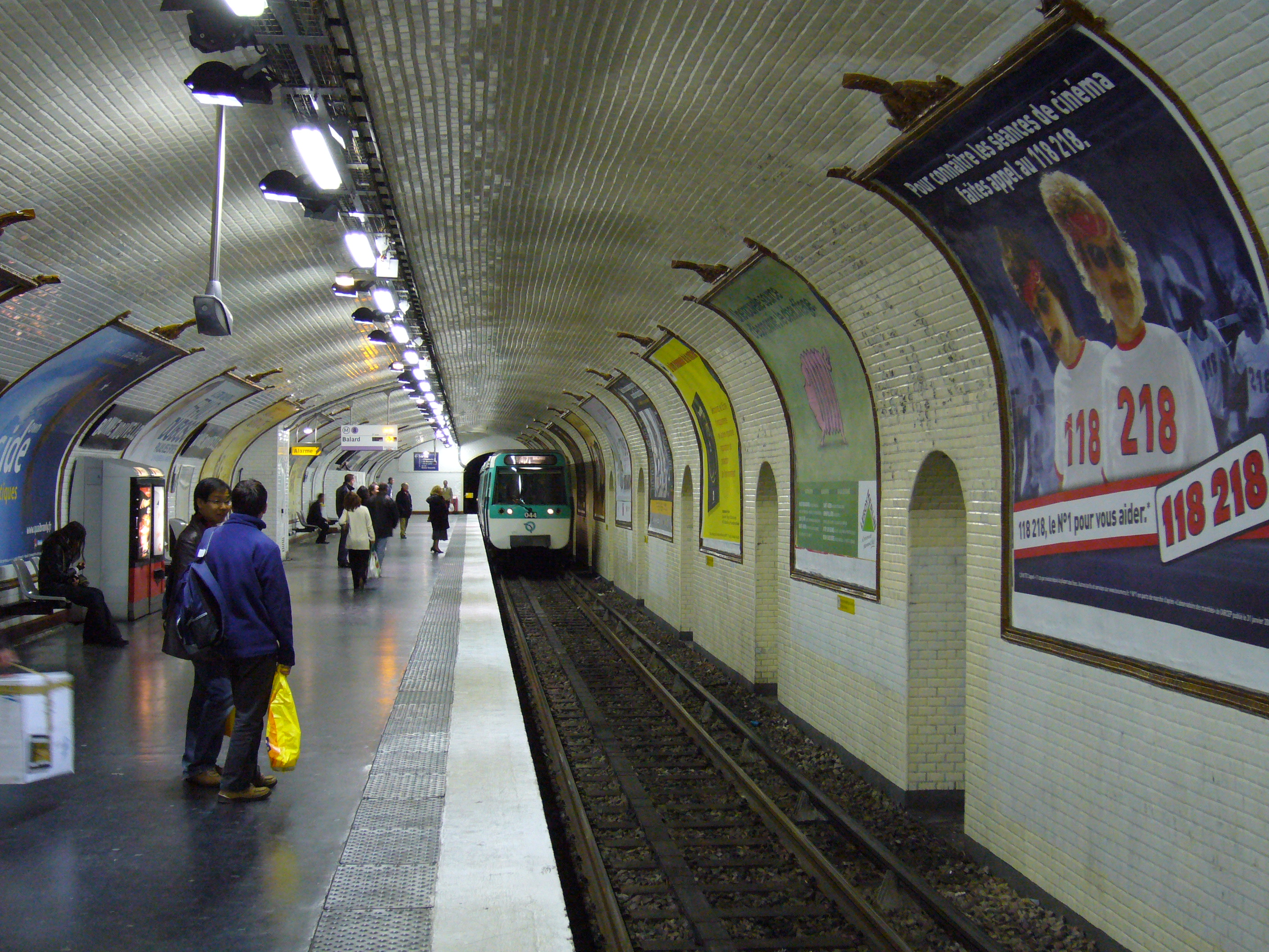 Vue d'un MF 77 entrant à la station Bonne Nouvelle en direction de Balard sur la ligne 8 du métro de Paris.